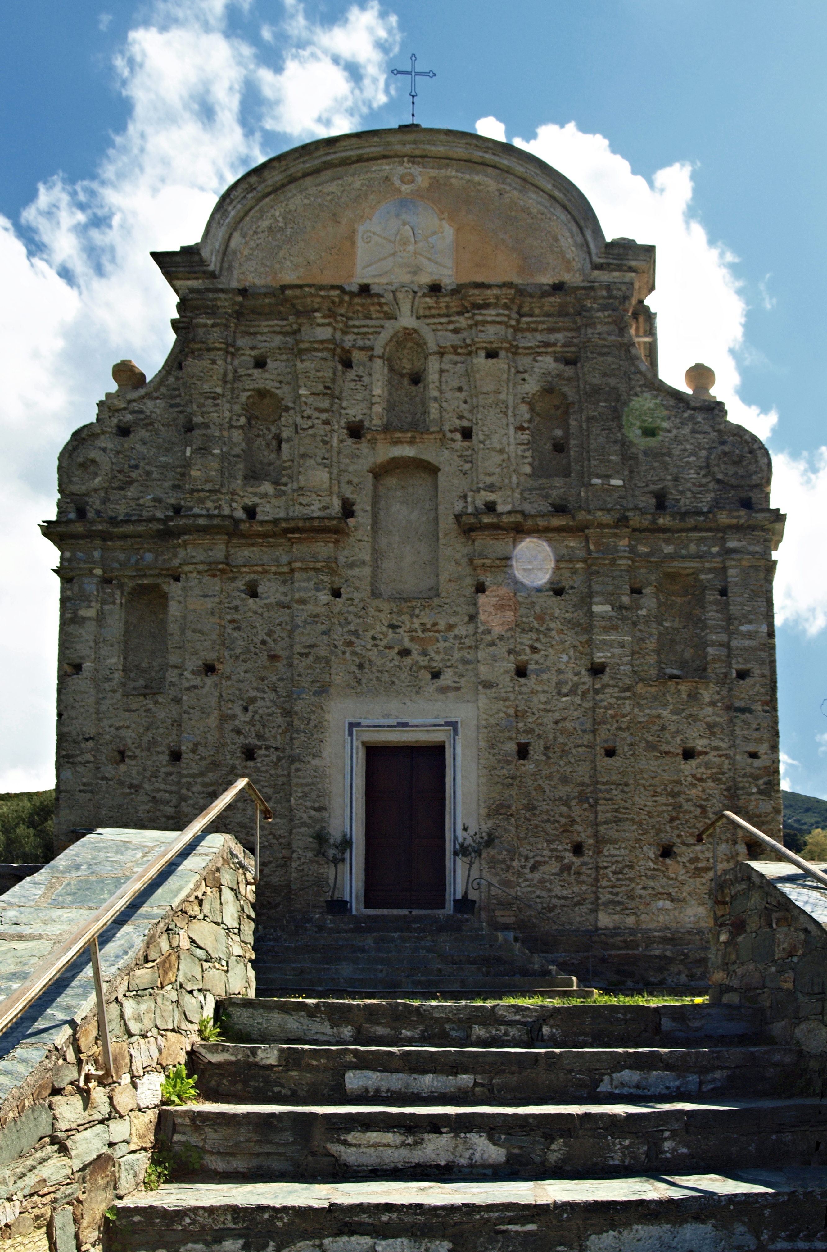 Patrimonio (Corsica) - Façade principale de l'église San Martinu